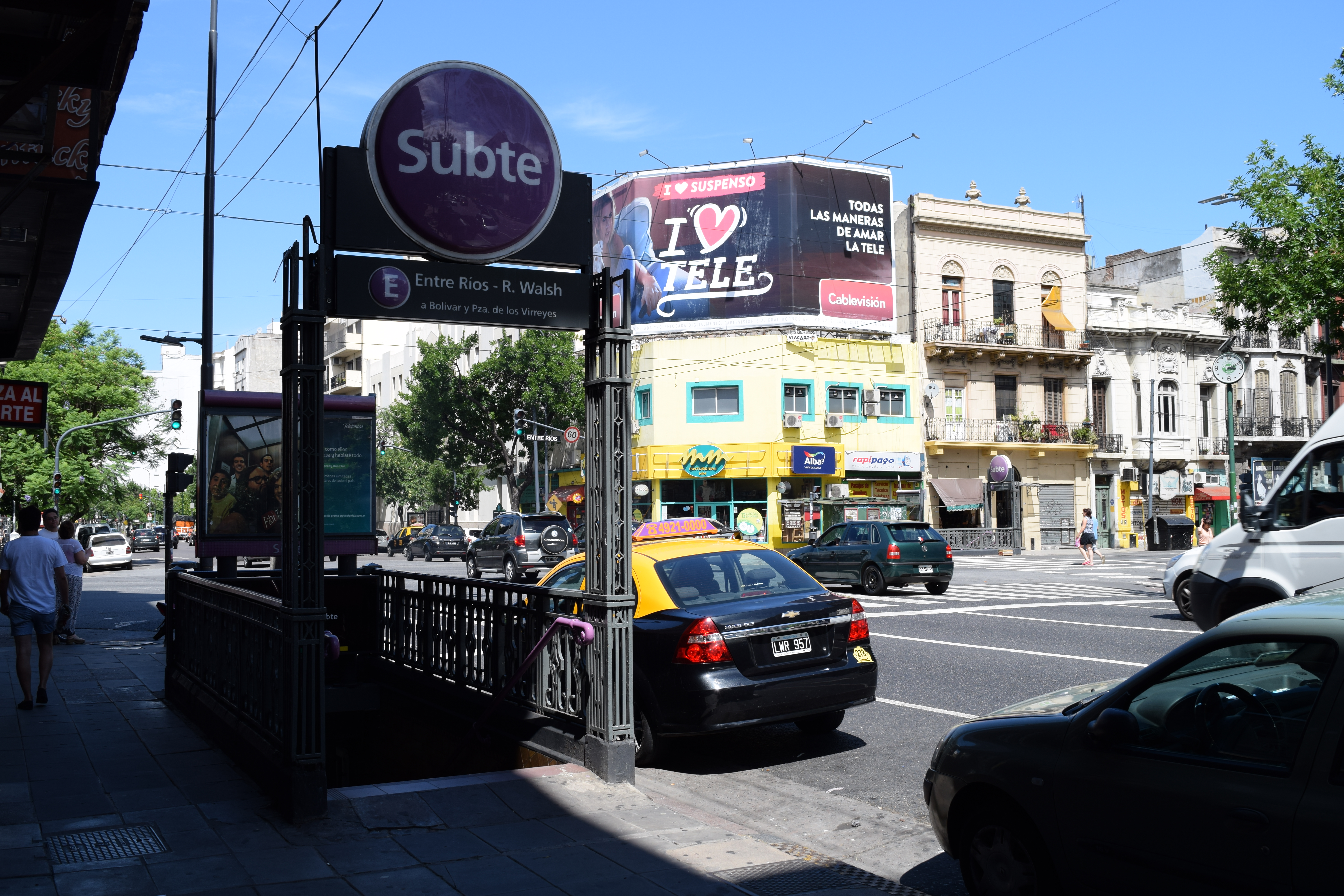 Acceso a la estación Entre Ríos - Rodolfo Walsh.